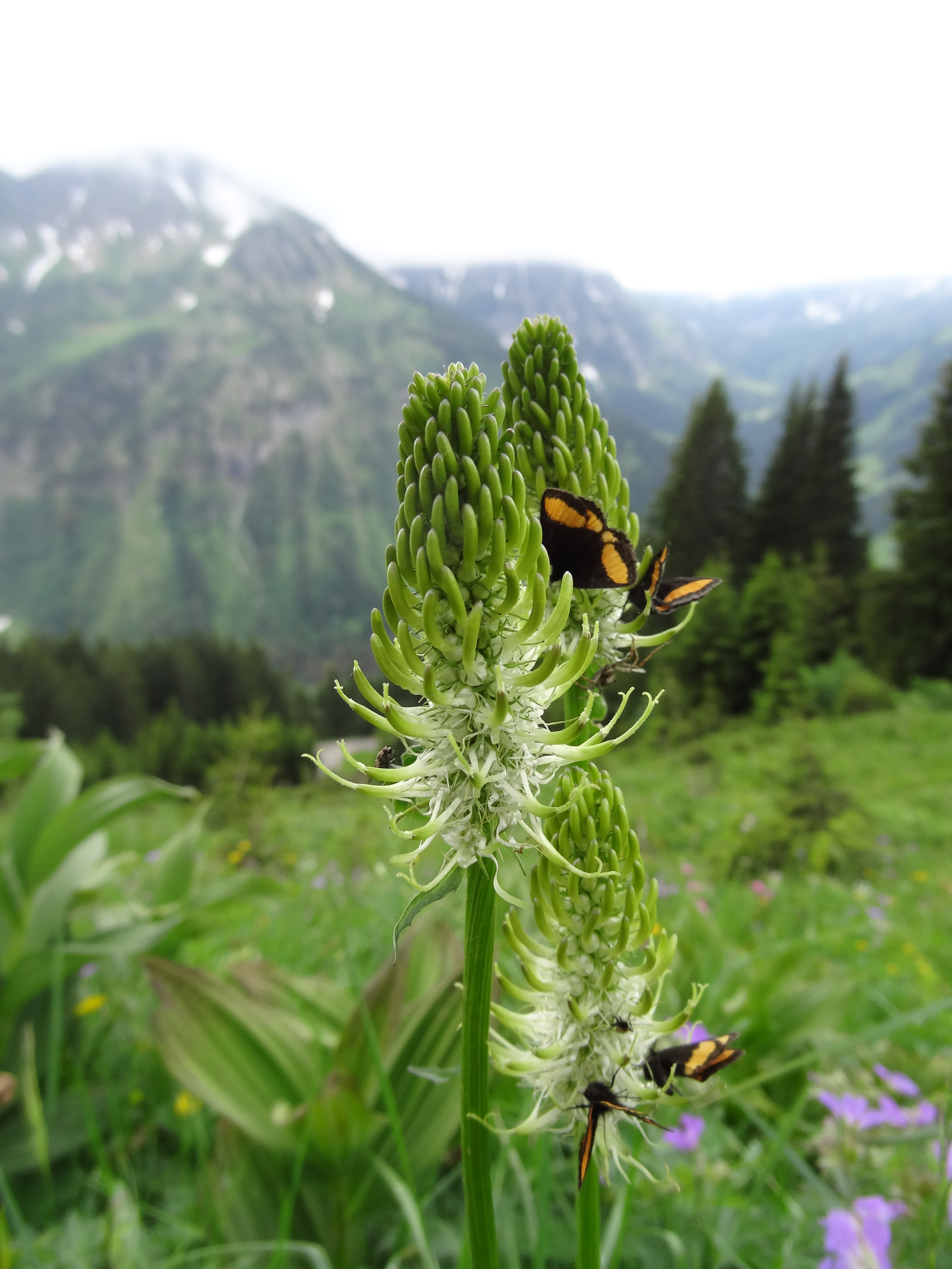 Kleinwalsertal, Mittelberg, 1300 m, Phyteuma spicatum, Ährige Rapunzel